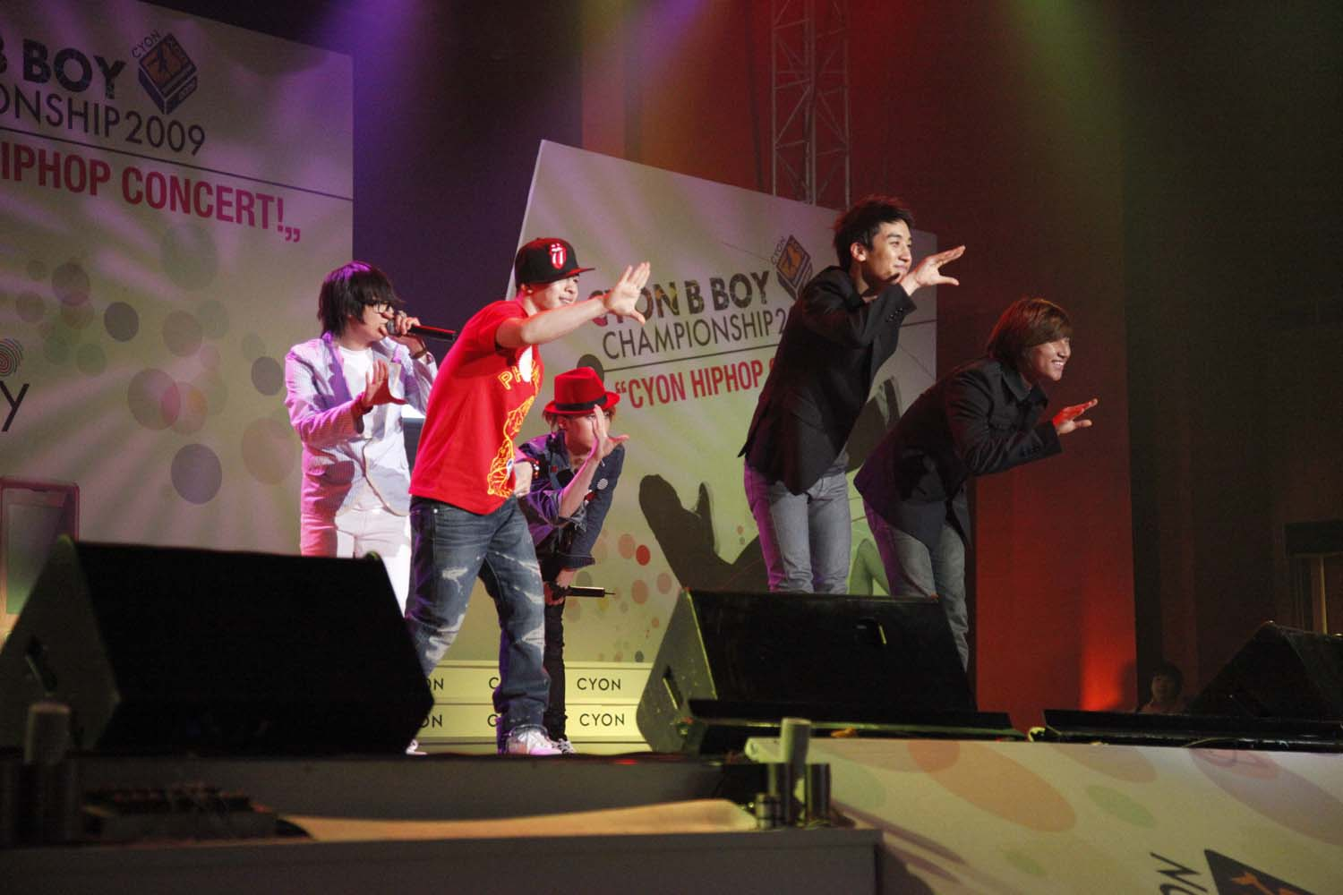 “비보이 대축제로 Yg세대 사로잡다!!” Lg전자, ‘Cyon 비보이 챔피언십 2009’ 본선 '09.5/23